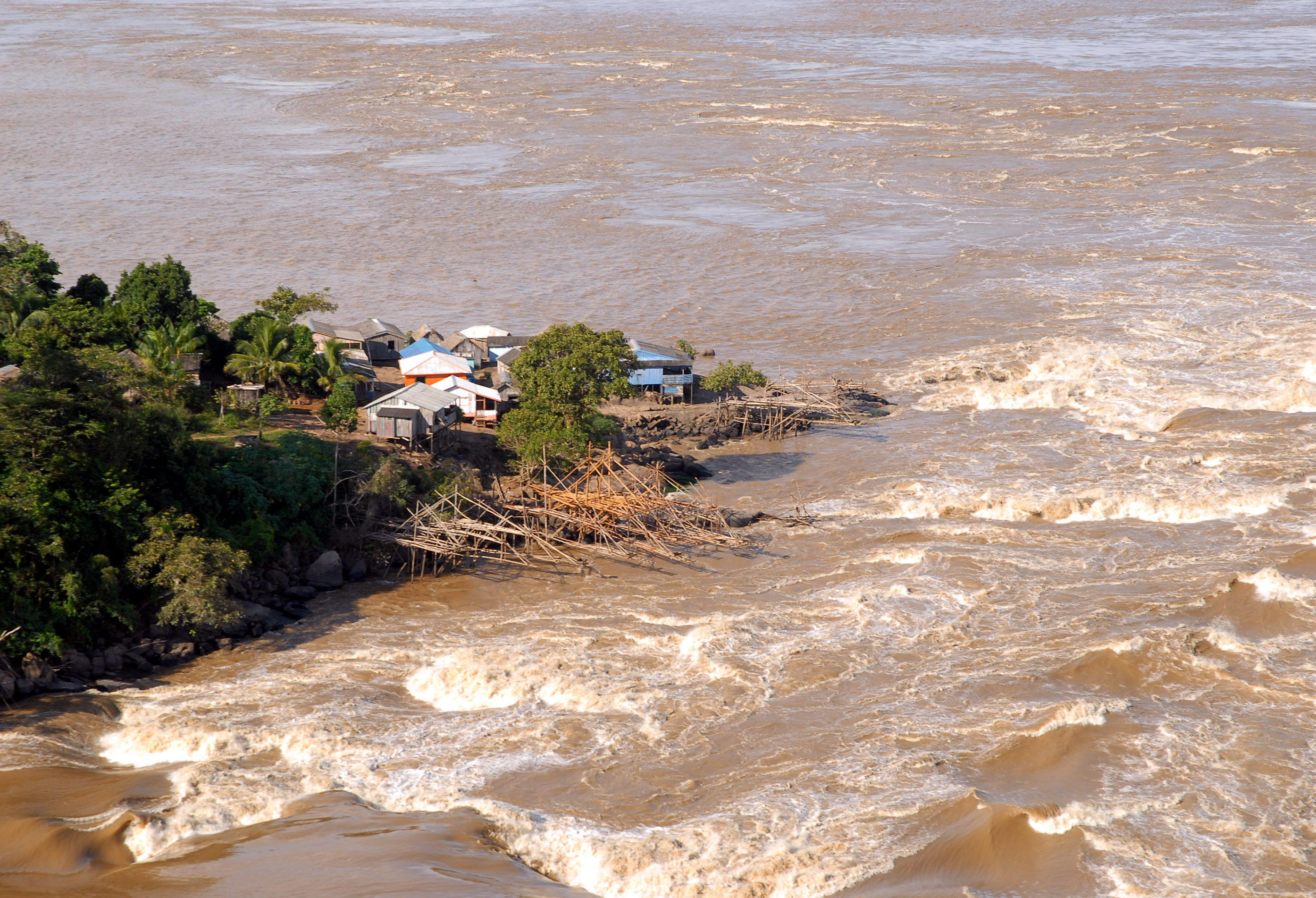 Porto Velho (RO) - A Cachoeira do Teotônio, que será submersa caso se construam as usinas de Jirau e Santo Antônio no Rio Madeira